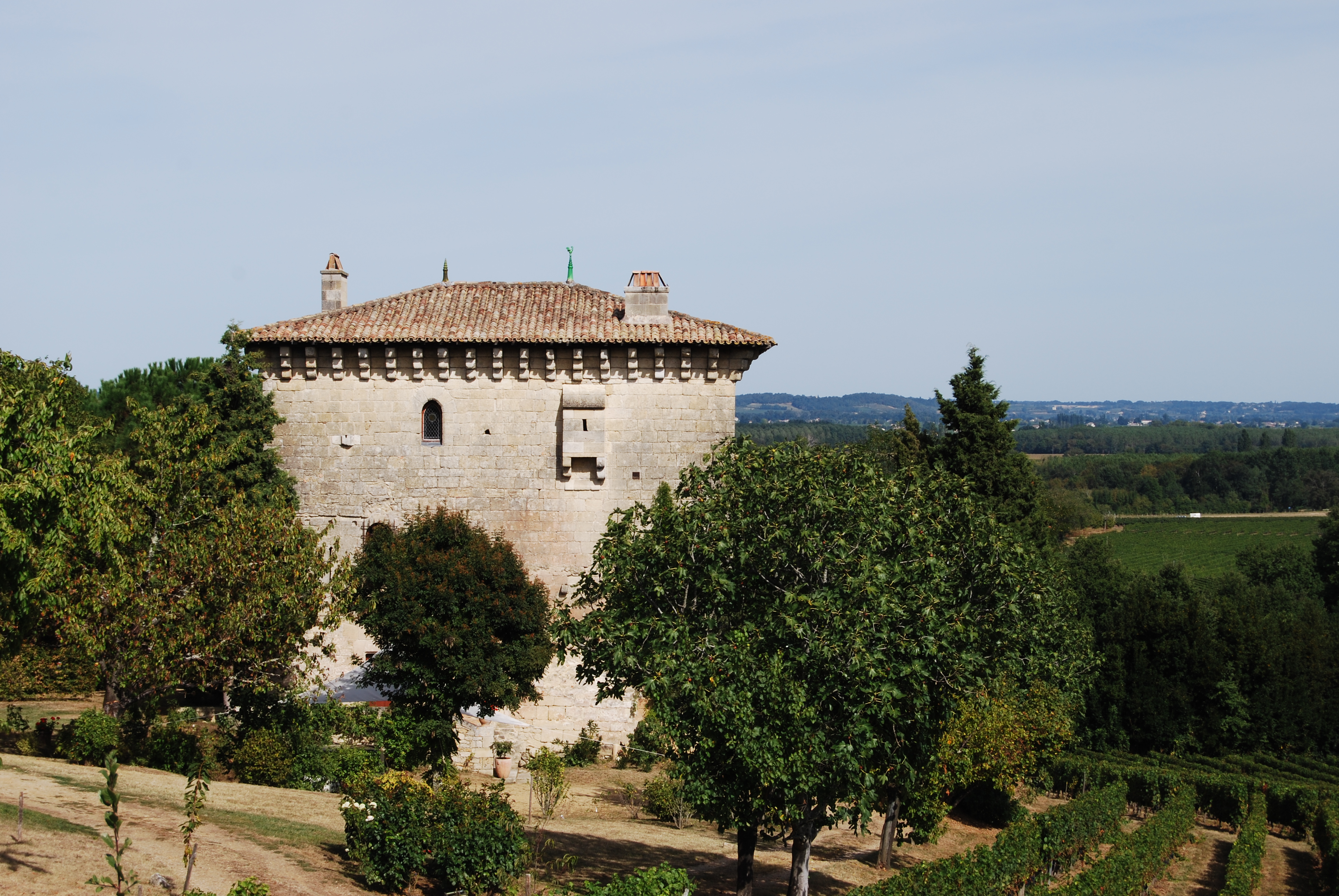 Tour de l'Ansouhaite, (Inscrit, 1966) .